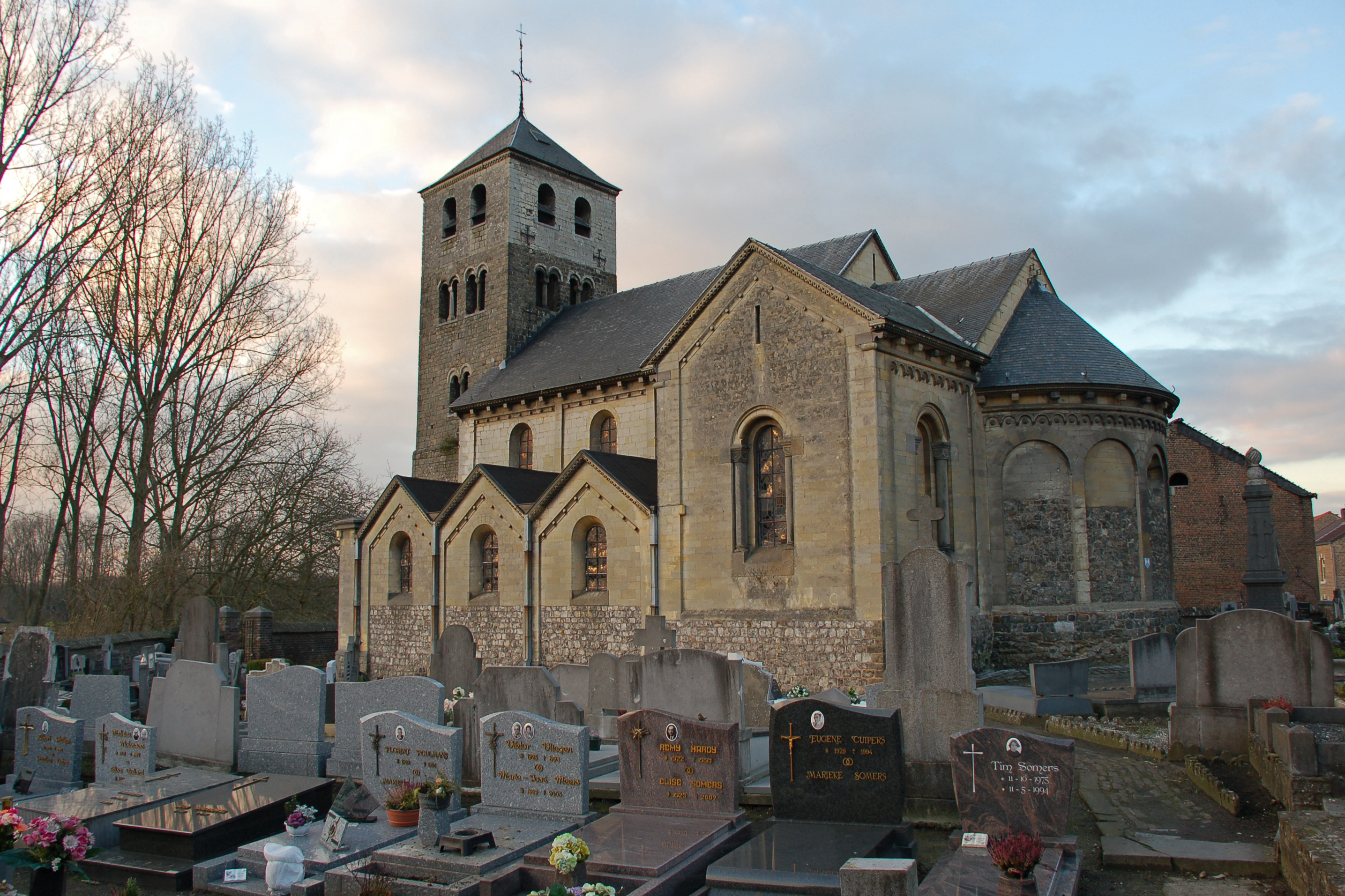 Sint-Servatuskerk, Limburg, Tongeren, Sluizen